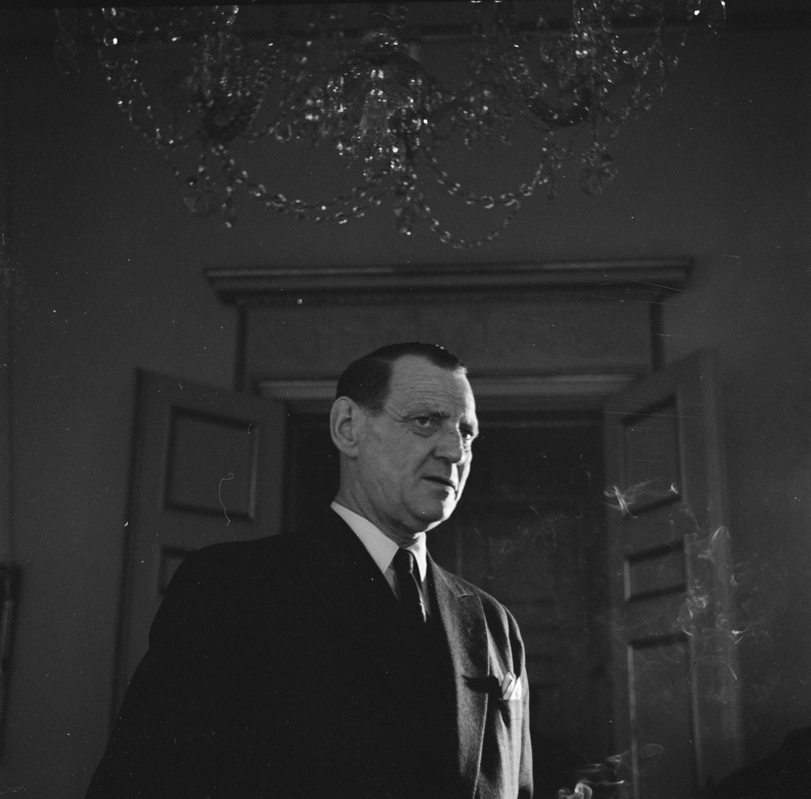 Collectie / Archief : Fotocollectie Van de Poll Reportage / Serie : Gezinsfoto's van de Deense koninklijke familie Beschrijving : Deense Koning in zijn woning in paleis Brockdorff in Slot Amalienborg Datum : maart 1954 Locatie : Denemarken, Kopenhagen Trefwoorden : interieurs, koningen, paleizen Persoonsnaam : Frederik IX (koning Denemarken) Fotograaf : Poll, Willem van de, [onbekend] Auteursrechthebbende : Nationaal Archief Materiaalsoort : Negatief (zwart/wit) Nummer archiefinventaris : bekijk toegang 2.24.14.02 Bestanddeelnummer : 252-8630